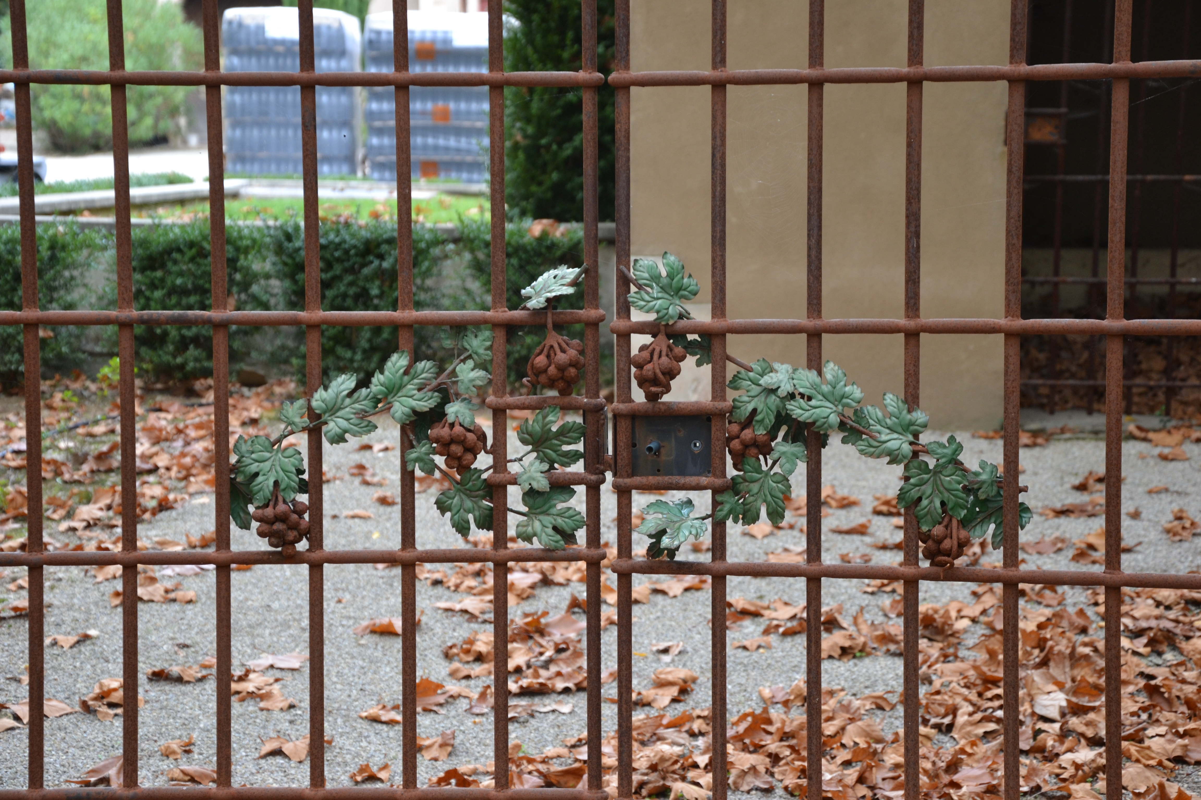 Bâtiments des anciennes thermes de Montmirail